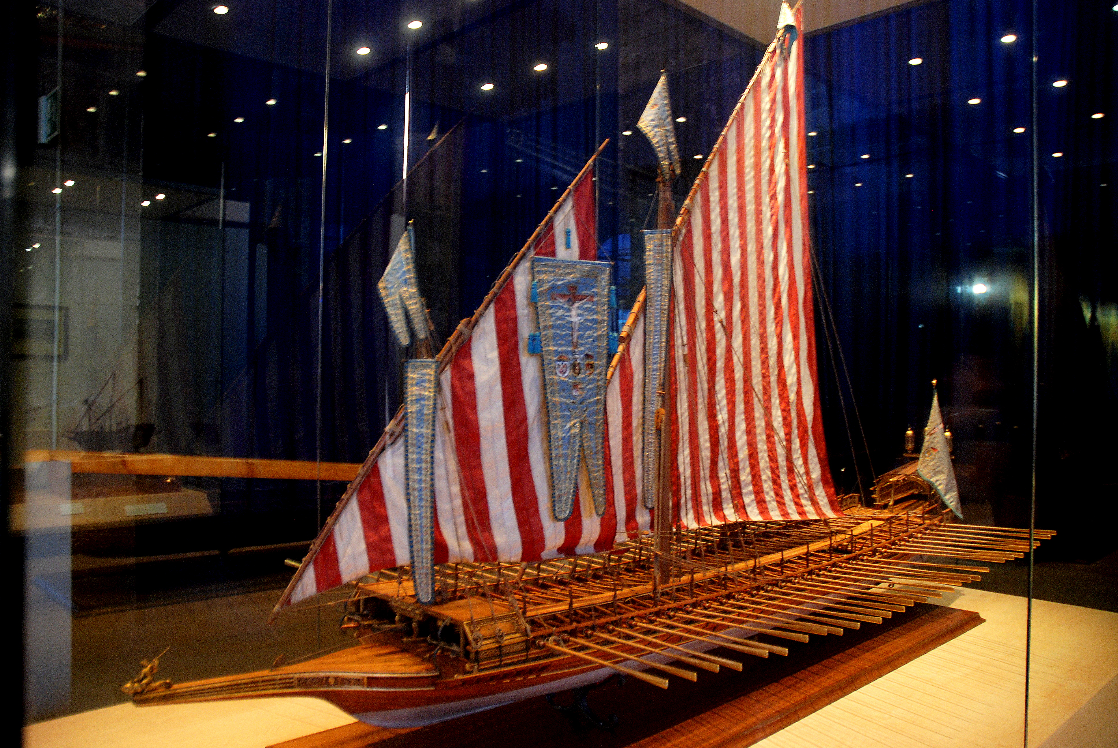 schaalmodel van de Real, het vlaggenschip van Juan van Oostenrijk, in het Museu Marítim de Barcelona